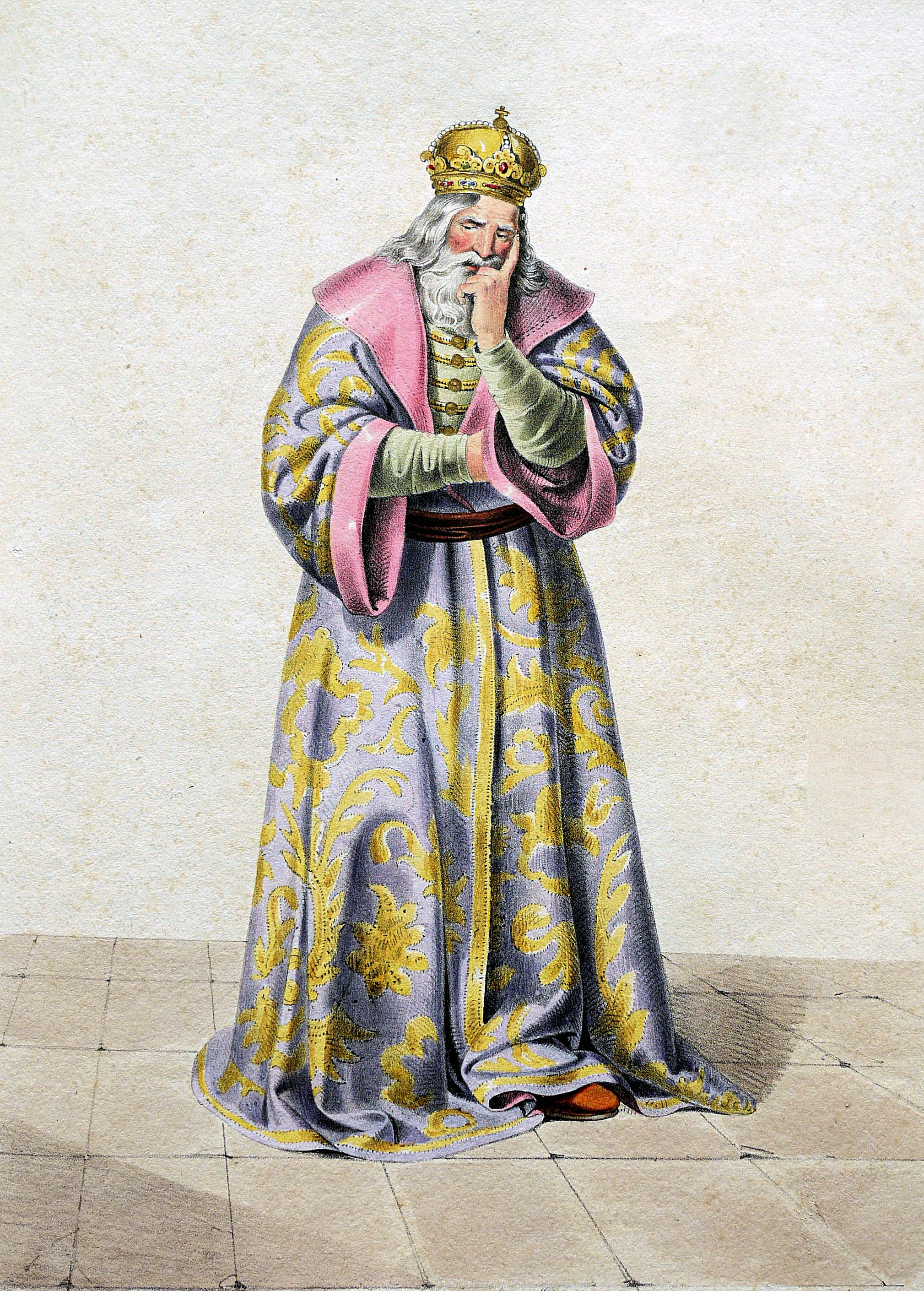 Géza II. (1130-1162), König von Ungarn etc. Lithographie von Josef Kriehuber nach einer Zeichnung von Moritz von Schwind aus Ungerns Erste Heerführer Herzoge und Koenige In einer Reihe von Bildnissen von Bela bis auf Seine Majestät Franz I. Kaiser Von Österreich König Von Ungern &c., &c. Wien : Lithographisches Institut ;ca. 1828.